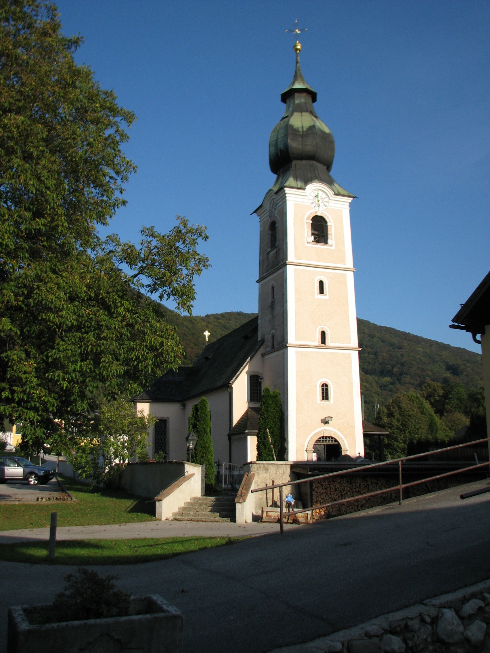 Kath. Pfarrkirche hl. Elisabeth